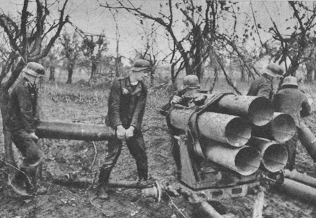 Un Nebelwerfer tedesco si appresta a lanciare i suoi micidiali razzi da 150 mm. sulle linee nemiche